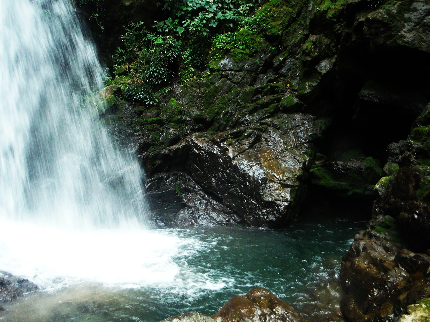 Posa en la catarata Cotomono